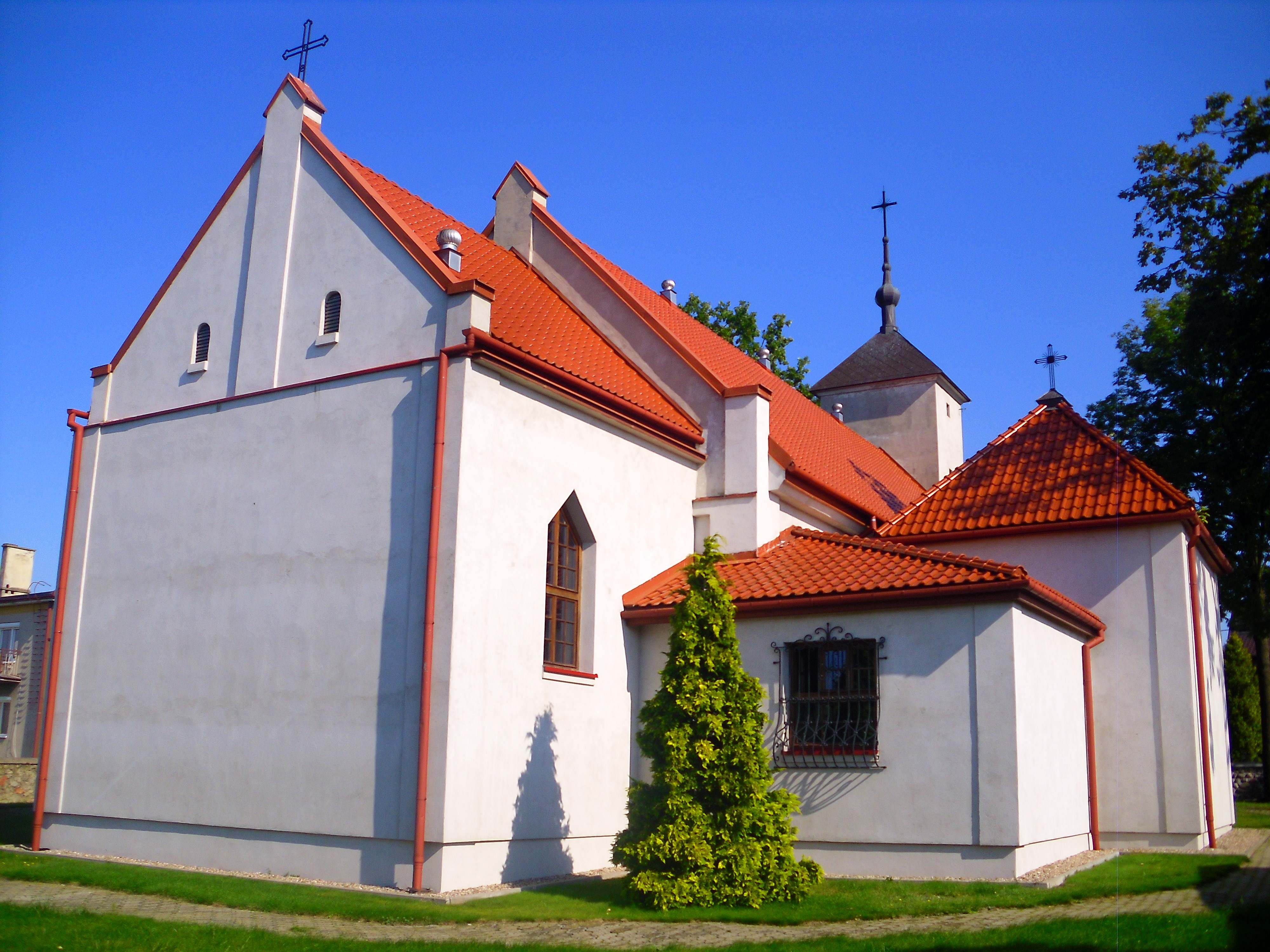 Kościół parafialny p.w. św. Anny w Bobrownikach (1787-1788, całkowicie przebudowany po 1994 r.).